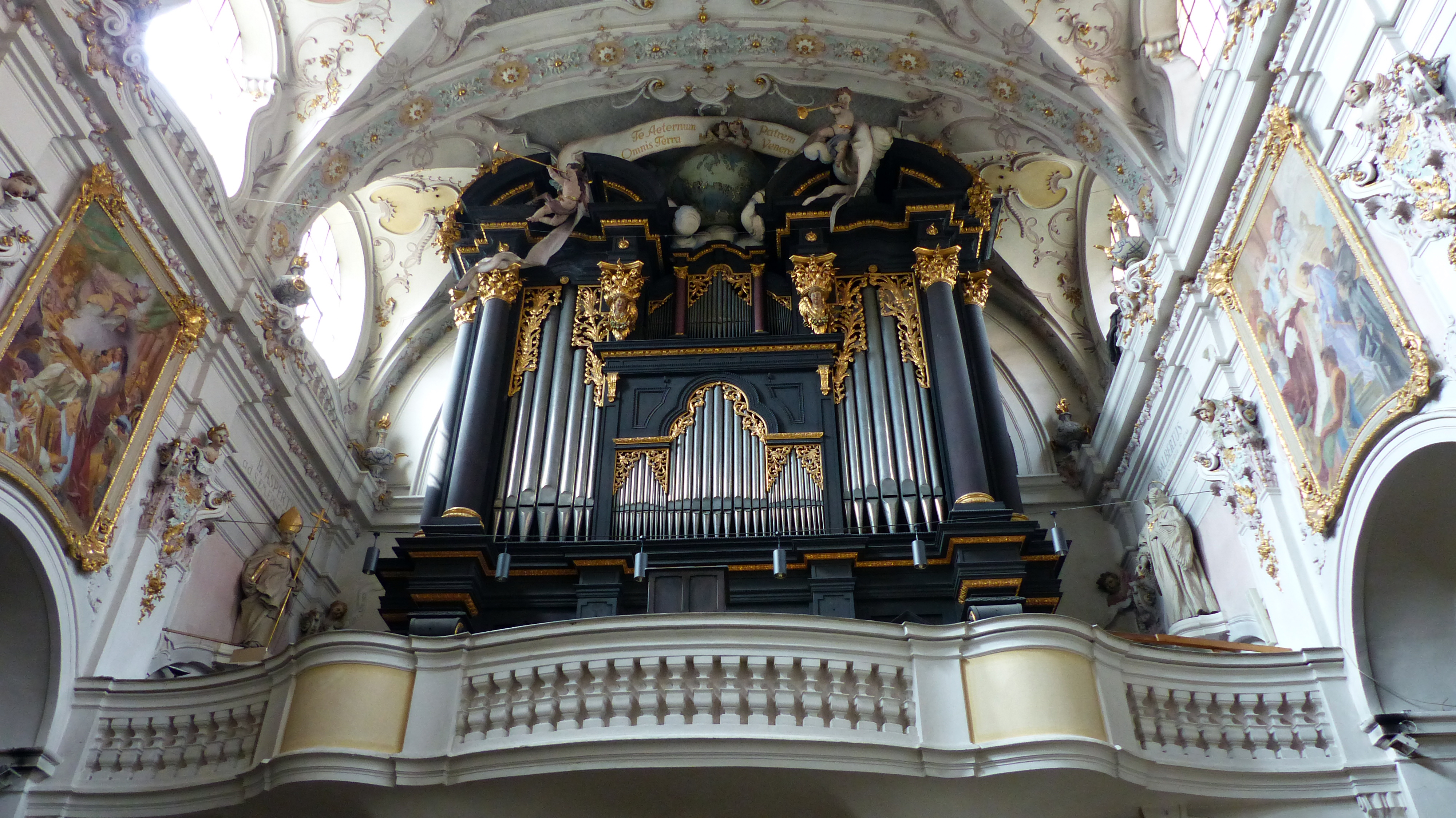 Basilika St. Emmeram, RegensburgThis is a photograph of an architectural monument.